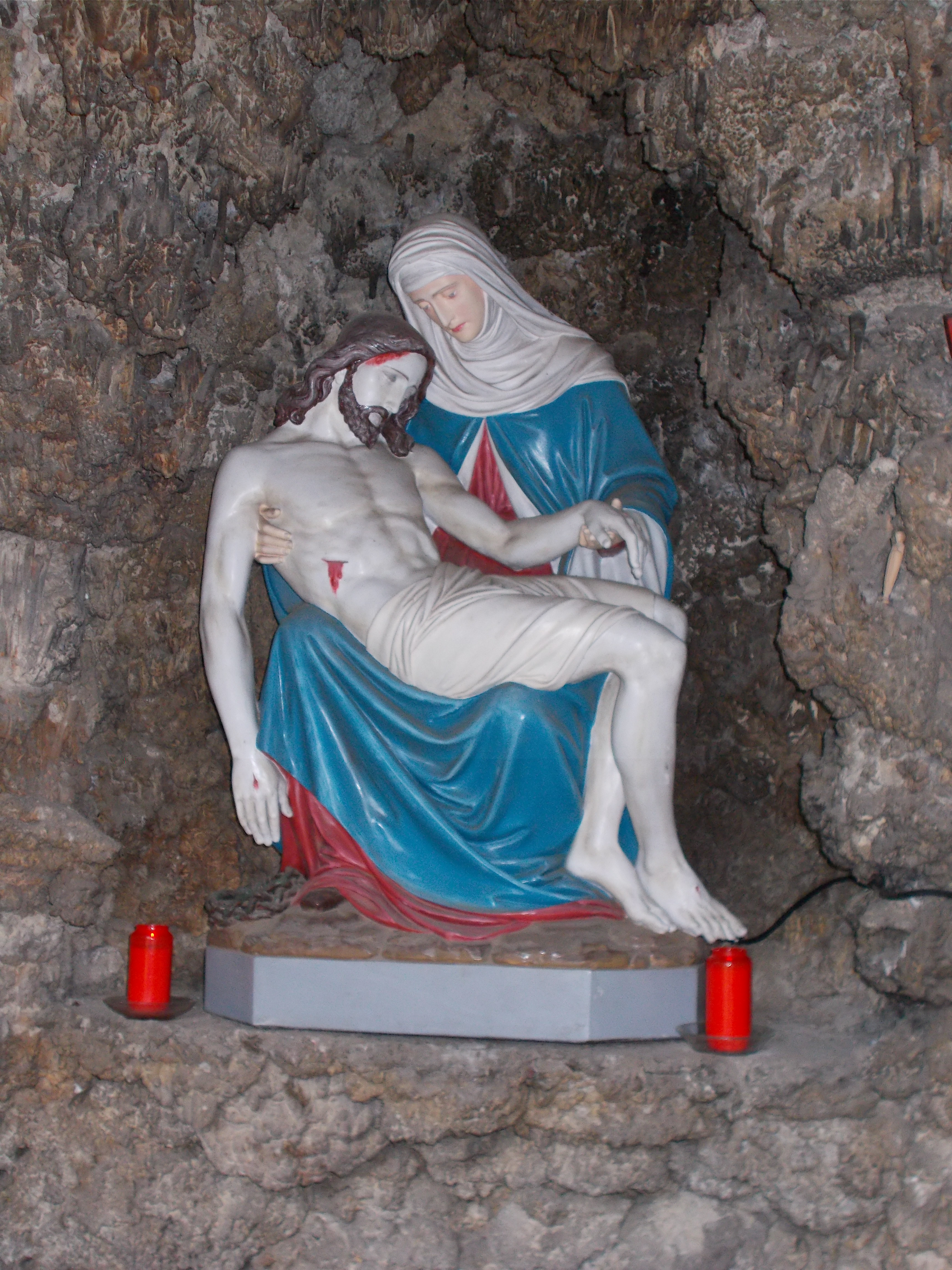 Pietà in der Grotte der 14 Nothelfer am Wallfahrtsort Hehn in Mönchengladbach.